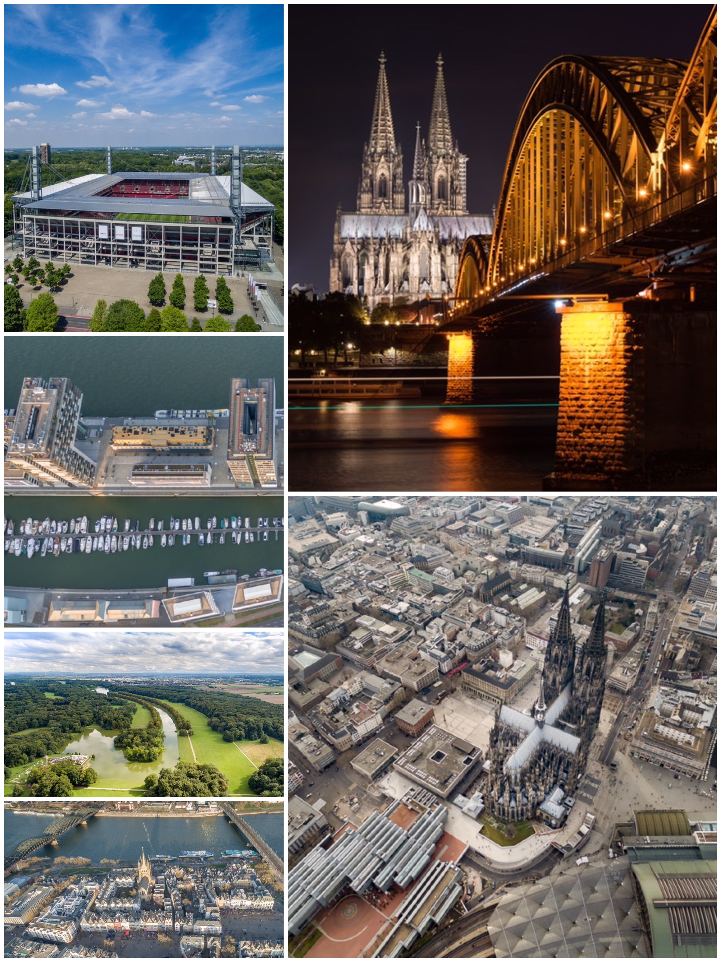 Köln bunt